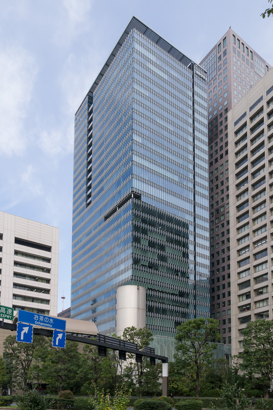 日経ビル、東京都千代田区大手町。